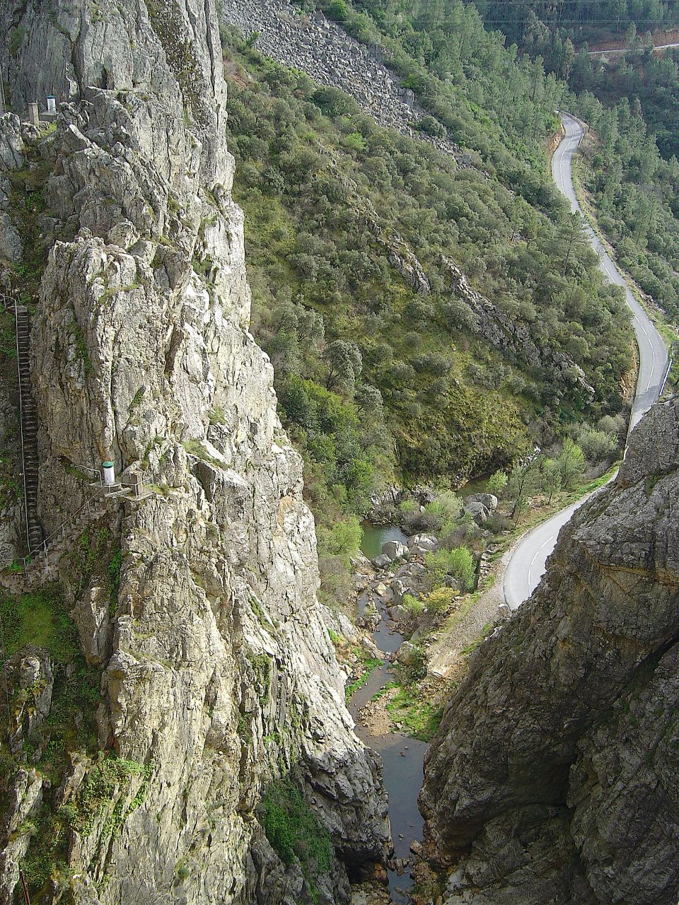 Vale do Rio Unhais - Pampilhosa da Serra